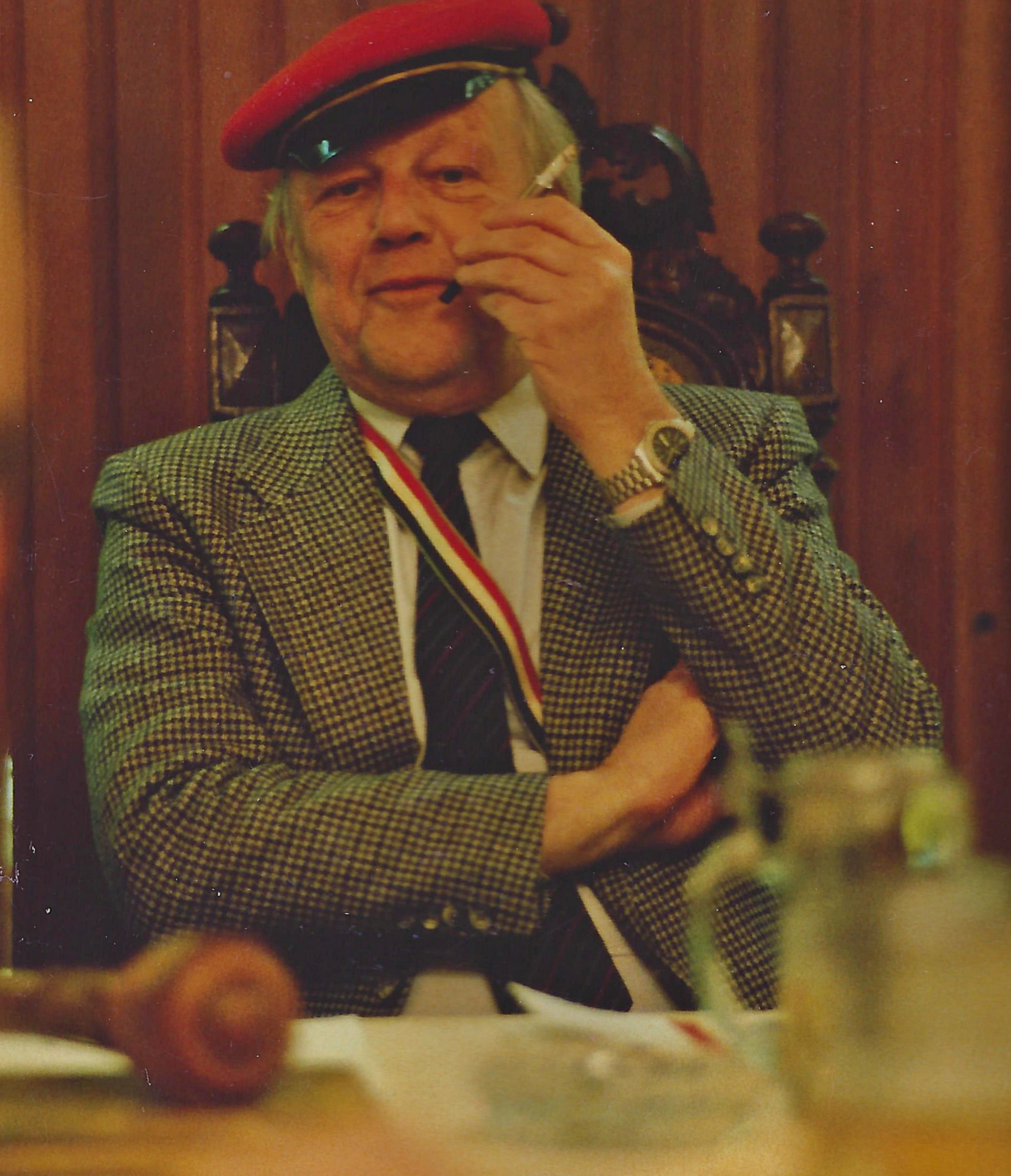 Wilhelm Röhl als Dominus praeses des Academischen Clubs zu Hamburg.